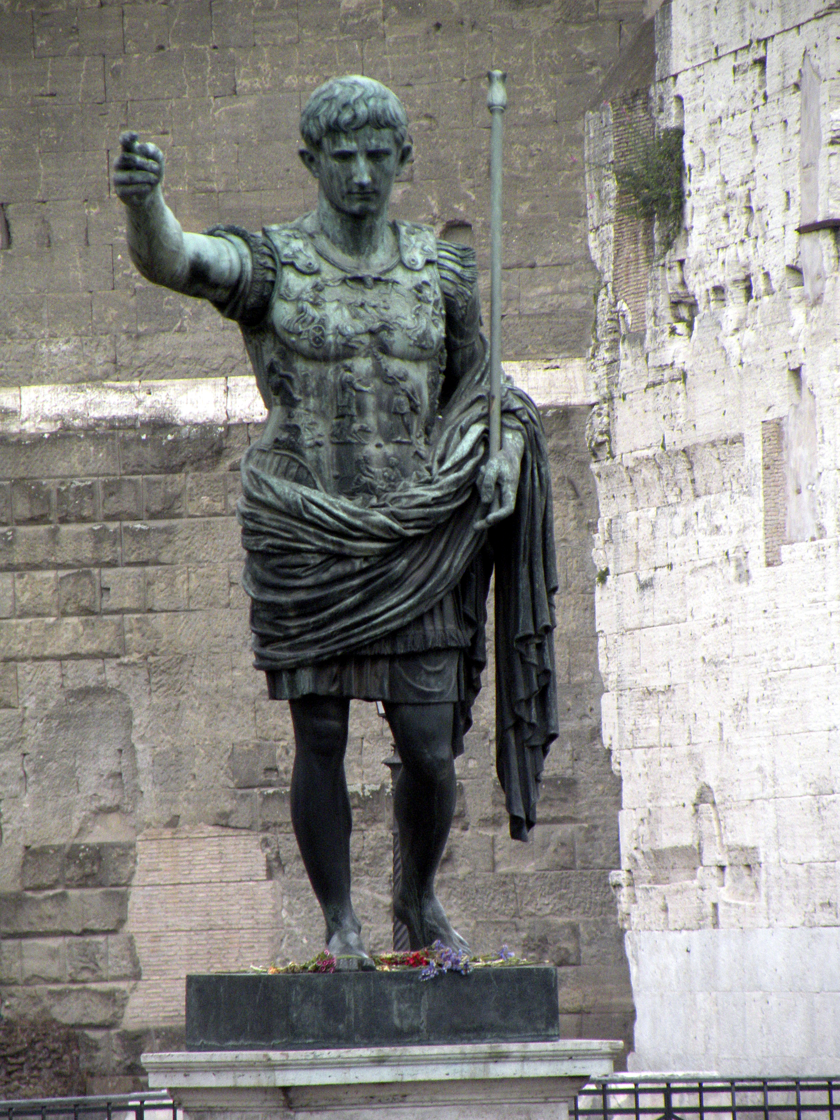 Octavianus,Augustus Gaius.